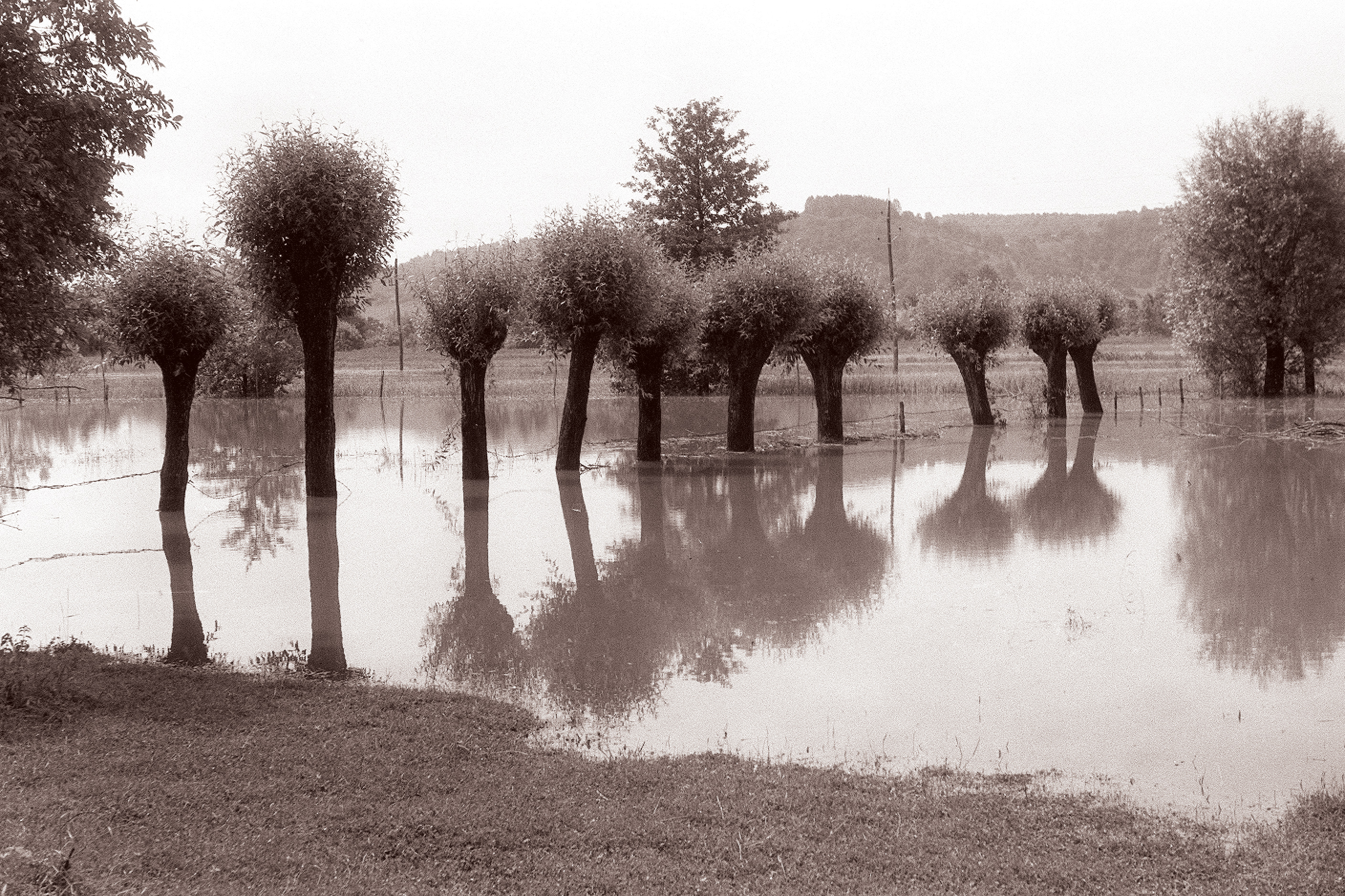 Narasla reka Pesnica